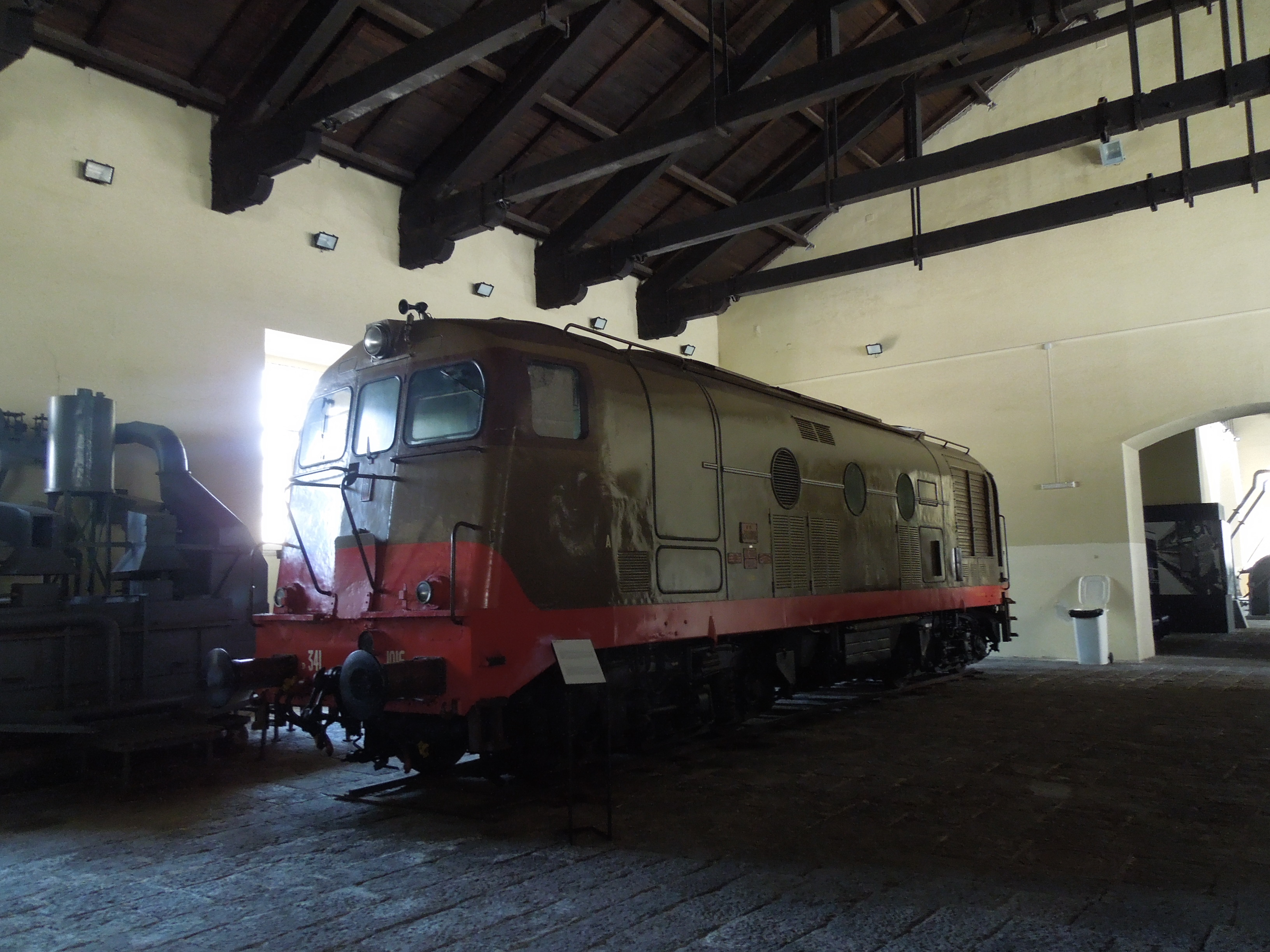 A Pietrarsa vasúttörténeti múzeum